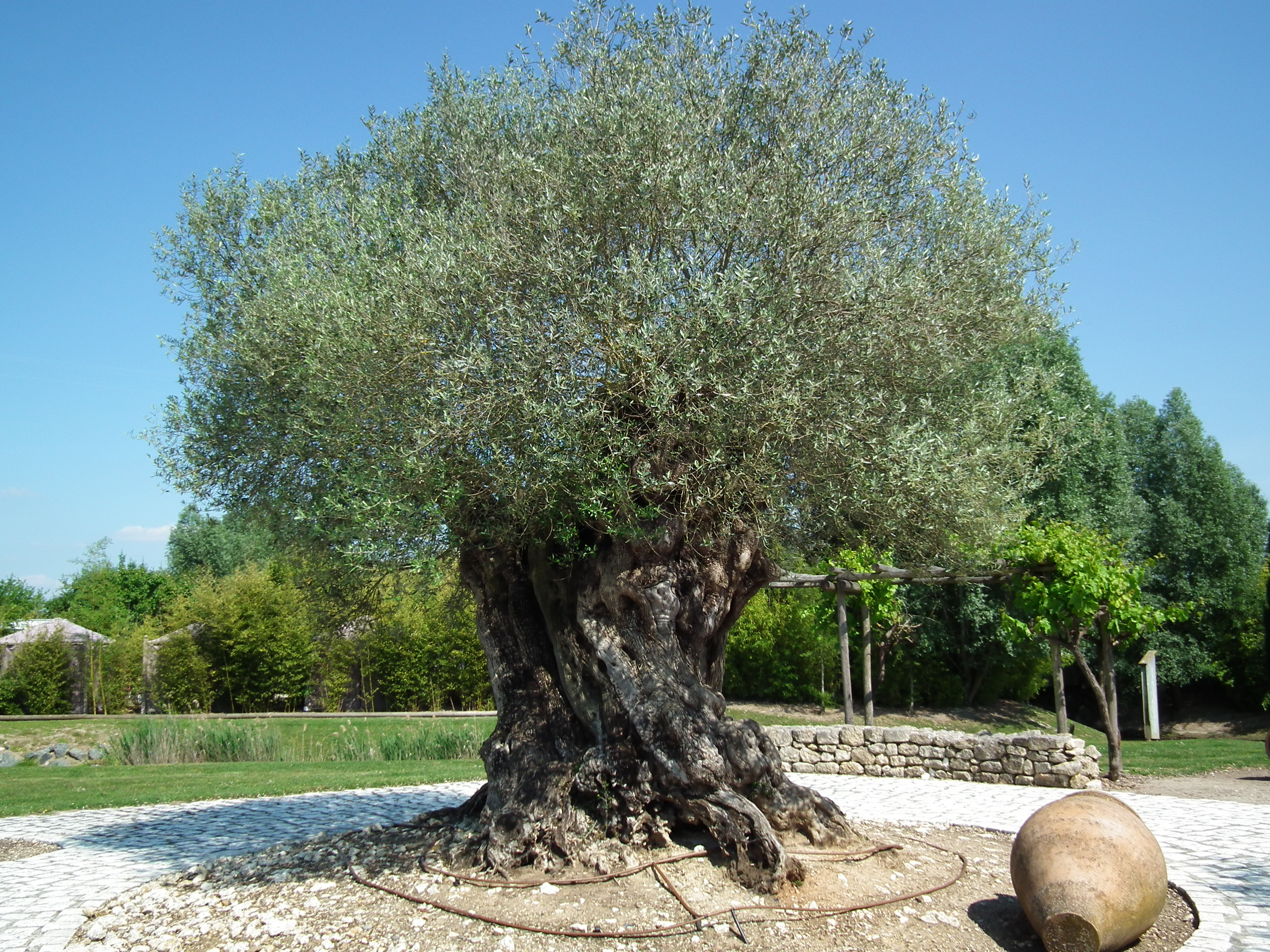 Jardins du Monde (Royan)